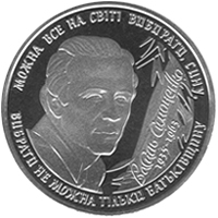 Пам'ятна монета НБУ 2 гривні привсячена Василю Андрійовичу Симоненко. Реверс